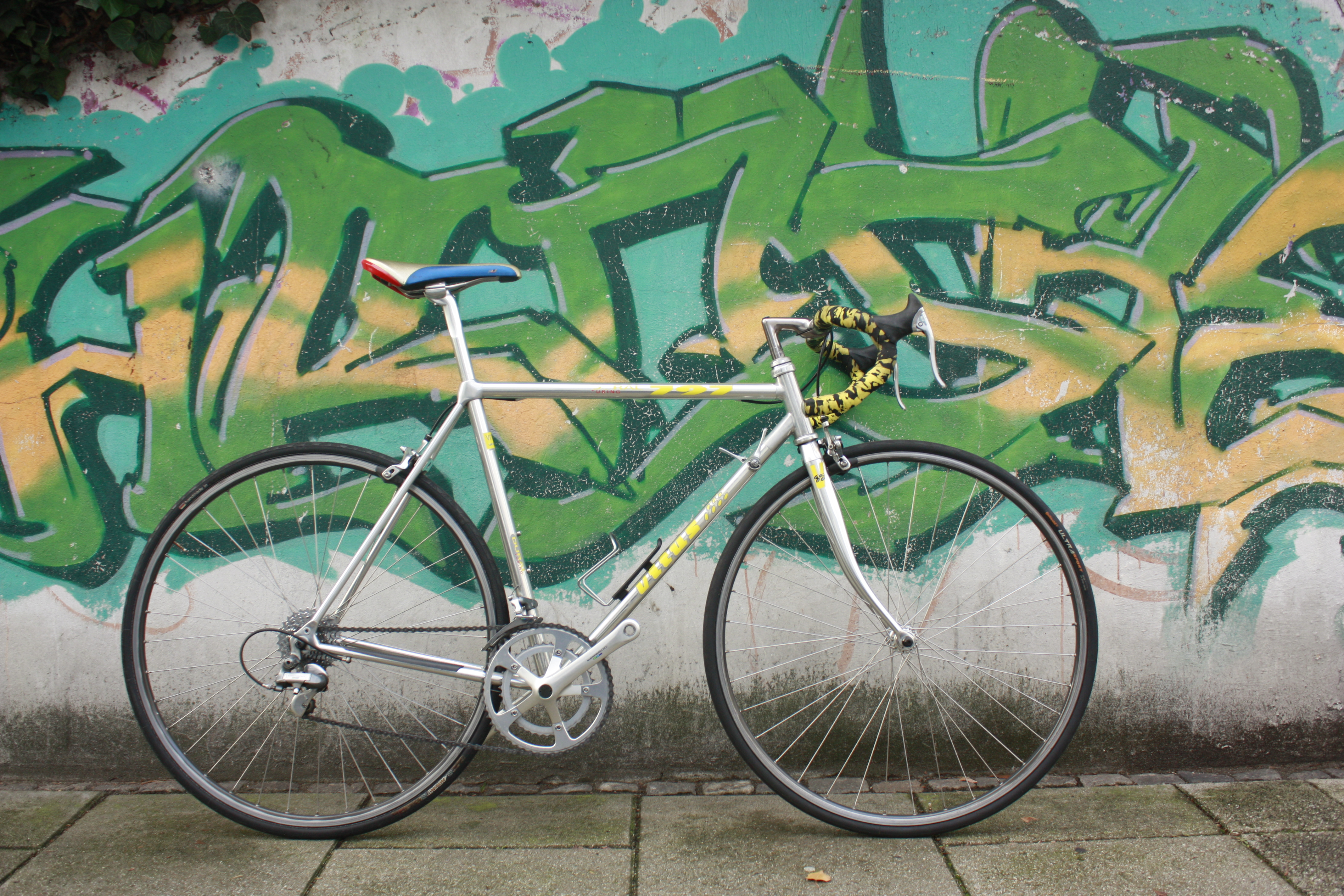 Vitus, one of the first alu road bikes